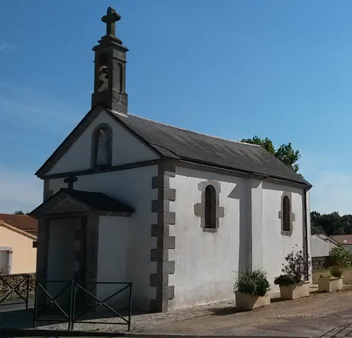 Chapelle de la Salette - bourg de Treize-Septiers - Vendée - France